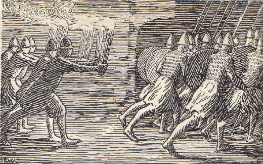 Svipdags sønner og mennene deres går til sjukongesalen